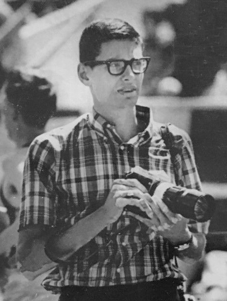 ORIG 1966 JIM RYUN, EAST H.S. WICHITA, KANSAS MILE RECORD HOLDER WIRE PHOTOGRAPH